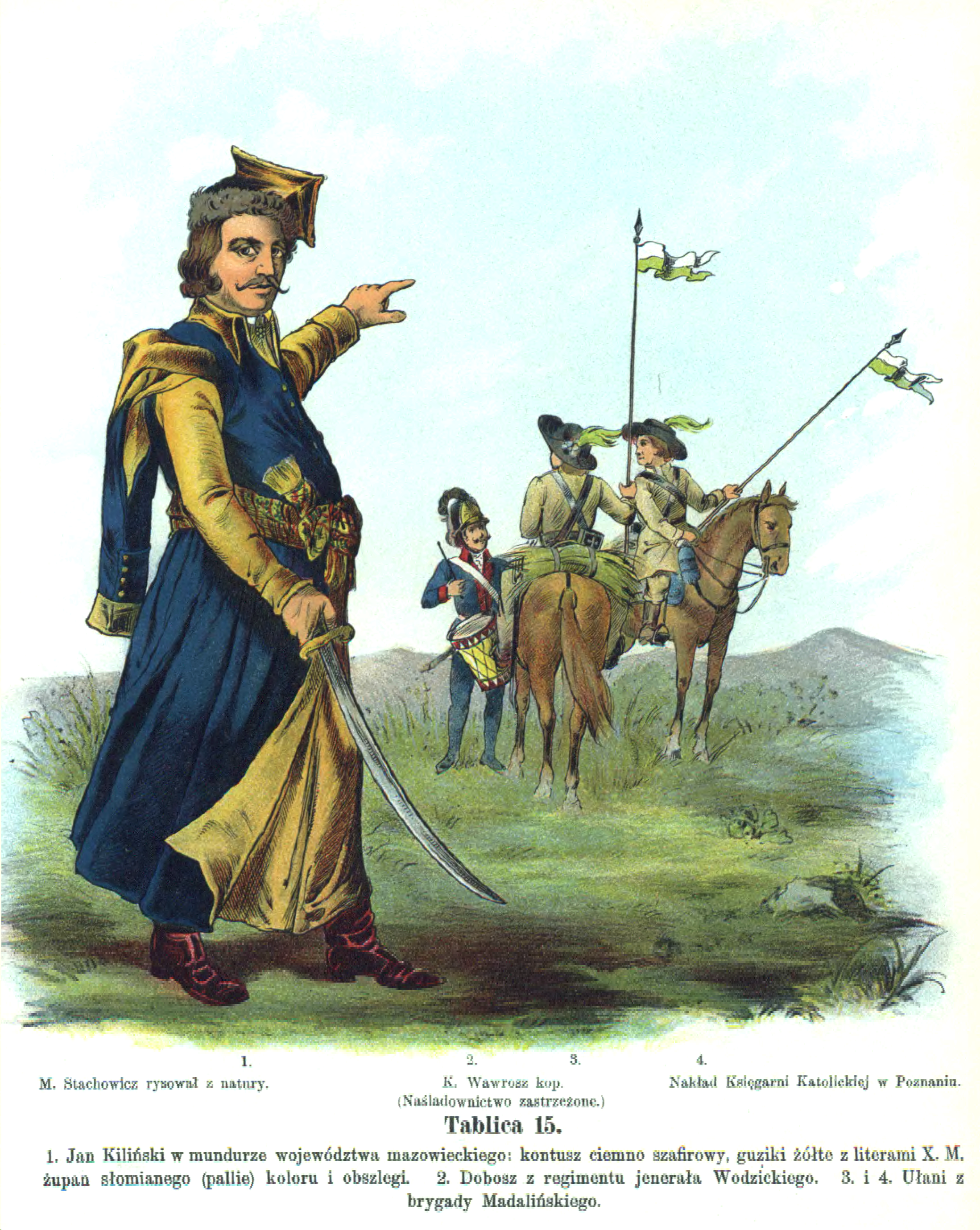 Jan Kiliński with Polish army 1794